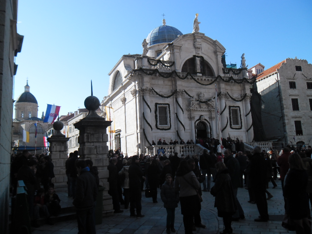 Dubrovnik na Festu svetog Vlaha 2014.